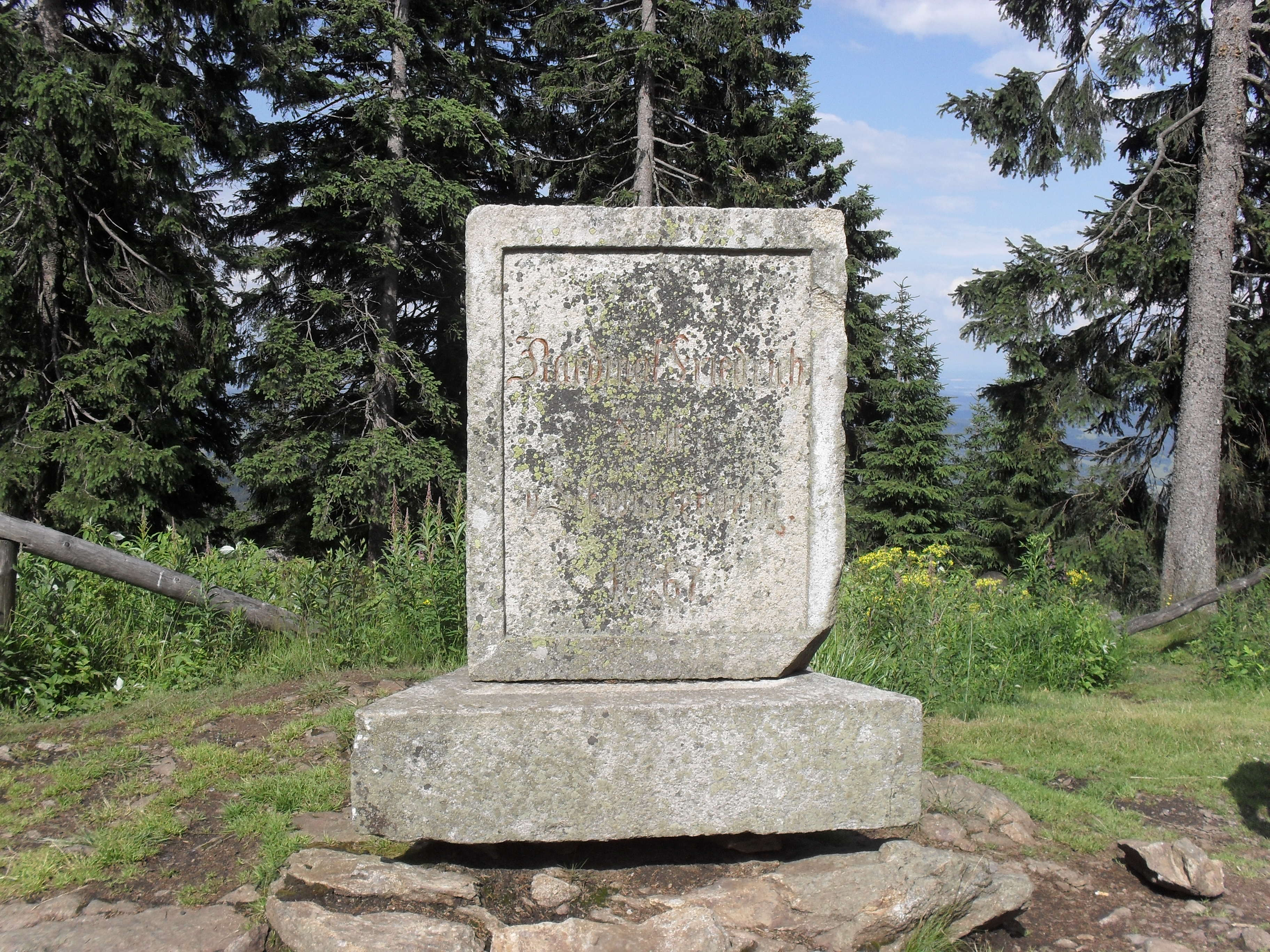 Můj dávný výlet na Šumavský Boubín.